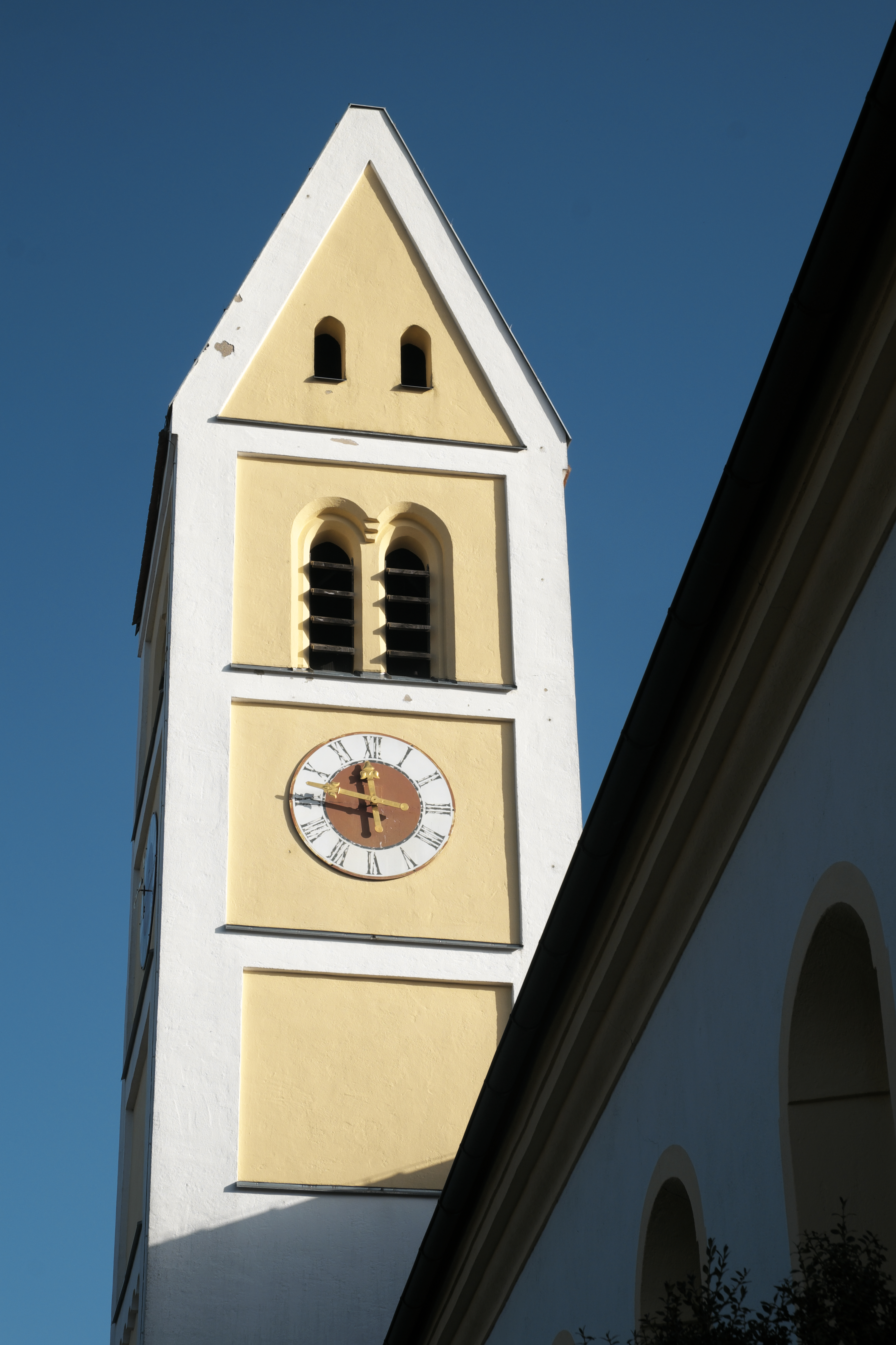 Katholische Pfarrkirche St. Laurentius in Petershausen im Landkreis Dachau (Bayern/Deutschland)